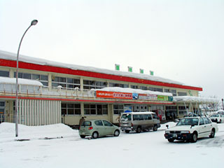 倶知安駅